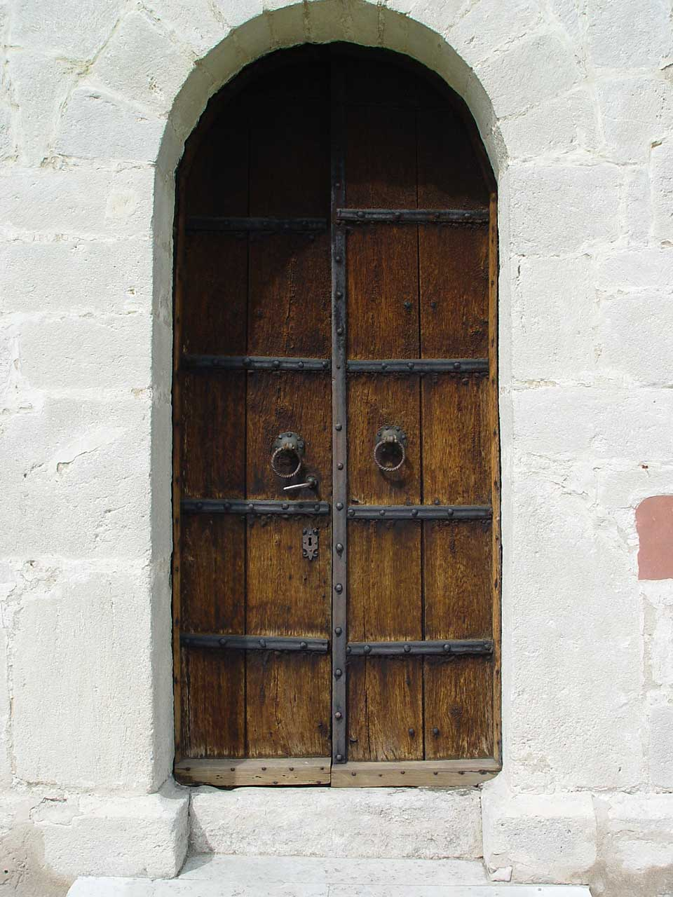 Fröjel-Kirche (Gotland). Südportal